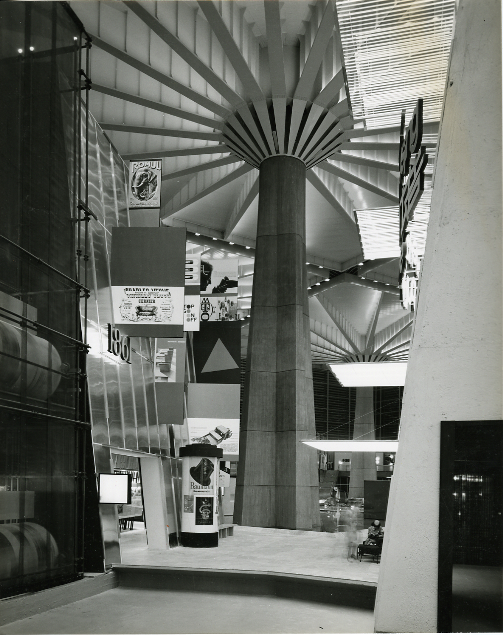 Servizio fotografico : Torino, 1961 / Paolo Monti. - Stampe: 2 : Positivo b/n, gelatina bromuro d'argento/ carta, 30x40. - ((Al verso delle stampe manoscritto numero di negativo corrispondente: 38897. Sul coperchio della scatola, manoscritto a pennarello: "Musei - Architettura Moderna ". - Occasione: Documentazione dell'esposizione internazionale Italia '61 tenutasi a Torino in occasione del centenario dell'unità d'Italia